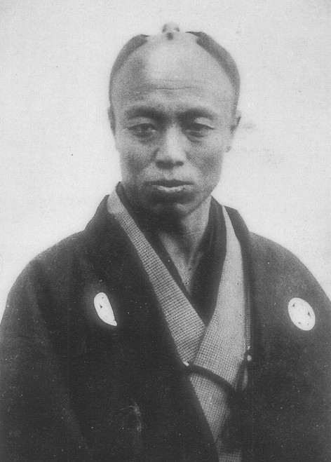 河井継之助 Kawai Tugunosuke.